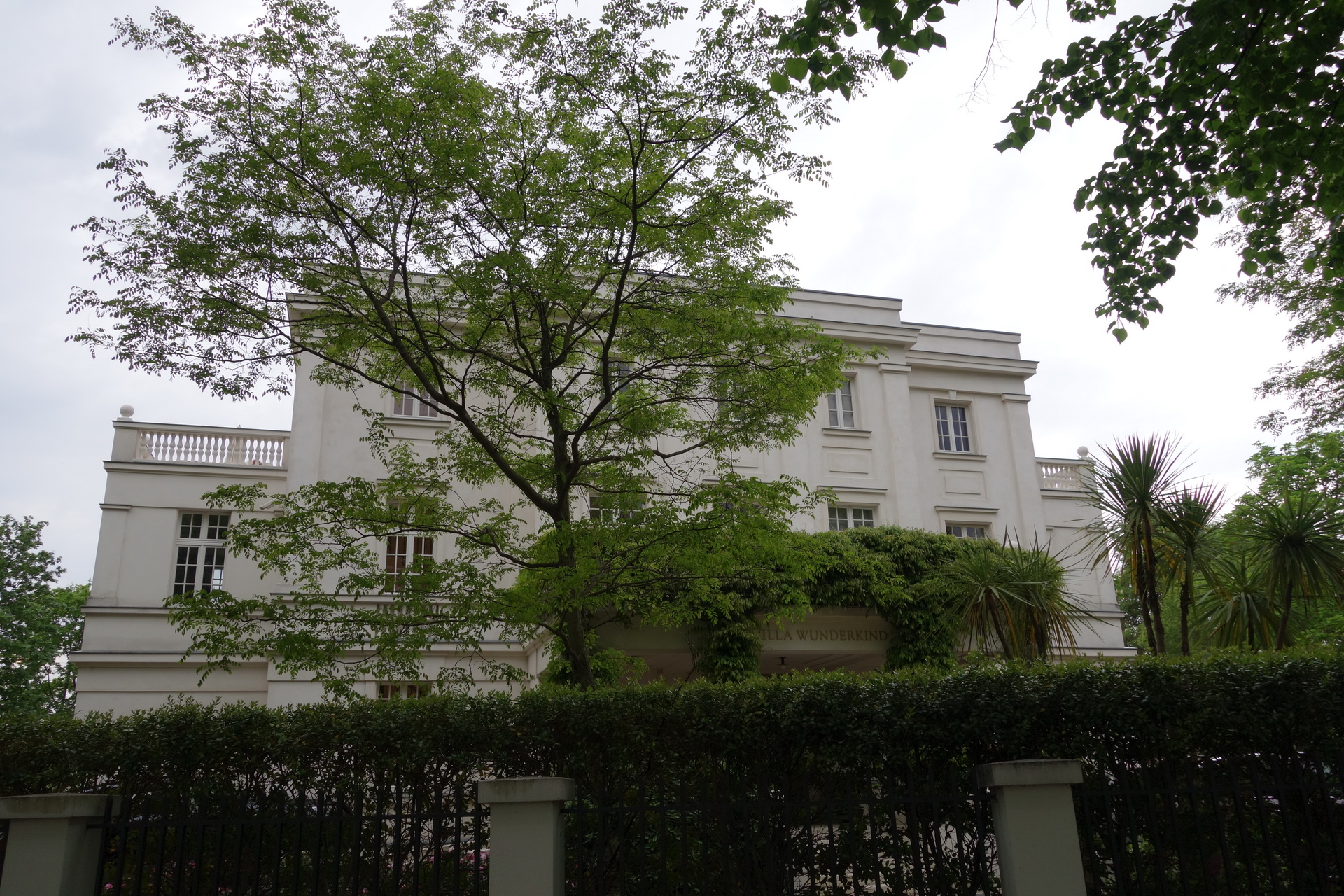 Denkmalgeschützte Villa (heute Villa Wunderkind) in der Seestraße 35-37 am Heiligen See in Potsdam (Straßenseite)